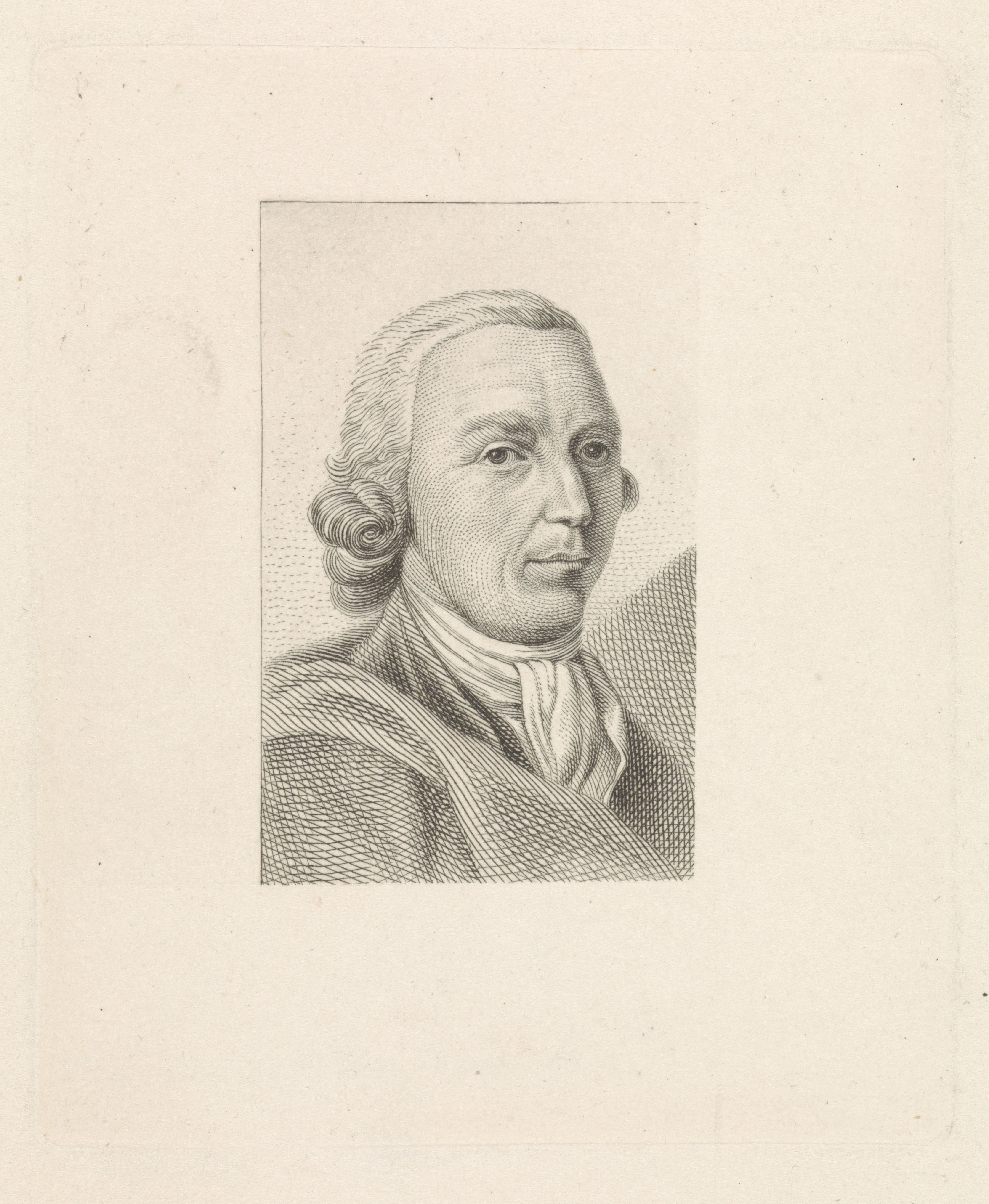 IdentificatieTitel(s): Portret van Pieter BarbiersObjecttype: prent Objectnummer: RP-P-1940-462Catalogusreferentie: 1(2)Opmerking: 2 staten bekendVan Someren 248Opschriften / Merken: verzamelaarsmerk, verso, gestempeld: Lugt 2228verzamelaarsmerk, verso, gestempeld: Lugt 2760Omschrijving: Portret van de kunstenaar Pieter Barbiers (I).VervaardigingVervaardiger: prentmaker: Jacob Ernst MarcusPlaats vervaardiging: AmsterdamDatering: 1817Fysieke kenmerken: ets en stippelets; druk van een deels met papier afgedekte plaatMateriaal: papier Techniek: graveren (drukprocedé) / etsenAfmetingen: plaatrand: h 117 mm × b 97 mmToelichtingLatere staat van de gehele prent gebruikt in: Roeland van Eynden, Adriaan van der Willigen, Geschiedenis der vaderlansche schilderkunst, sedert de helft der XVIII eeuw. Haarlem, A. Loosjes, Pz [vanaf dl 3: Wed. A. Loosjes], 4 dln., 1816-40.OnderwerpWie: Pieter Barbiers (I)Verwerving en rechtenCredit line: Aankoop uit het F.G. Waller-FondsVerwerving: aankoop 1940Copyright: Publiek domein